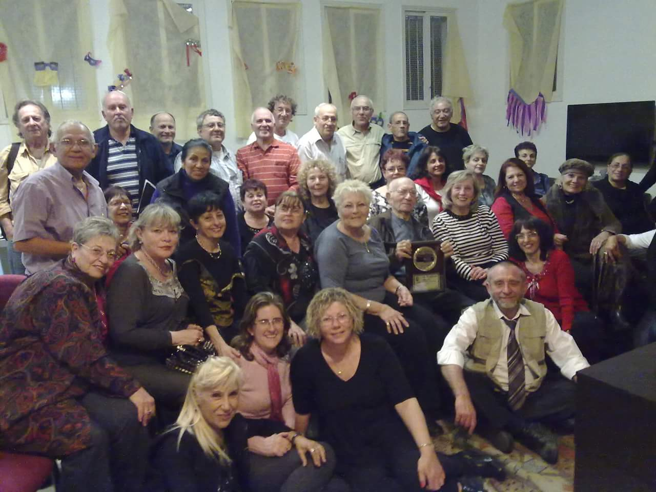 מנוחת המקהלה